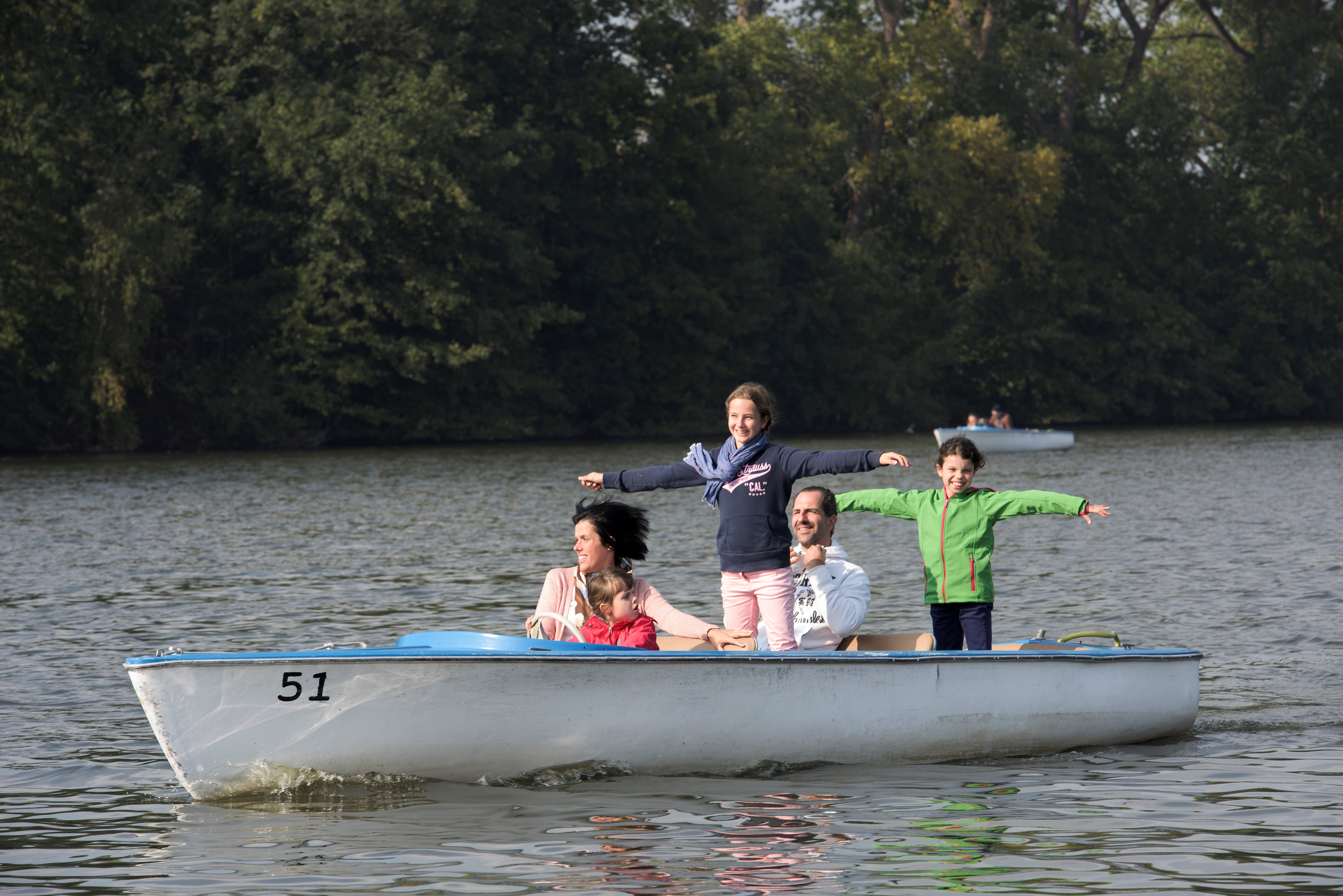 Bootje met e-motor om het Donkmeer in Berlare vanop het water te ontdekken.